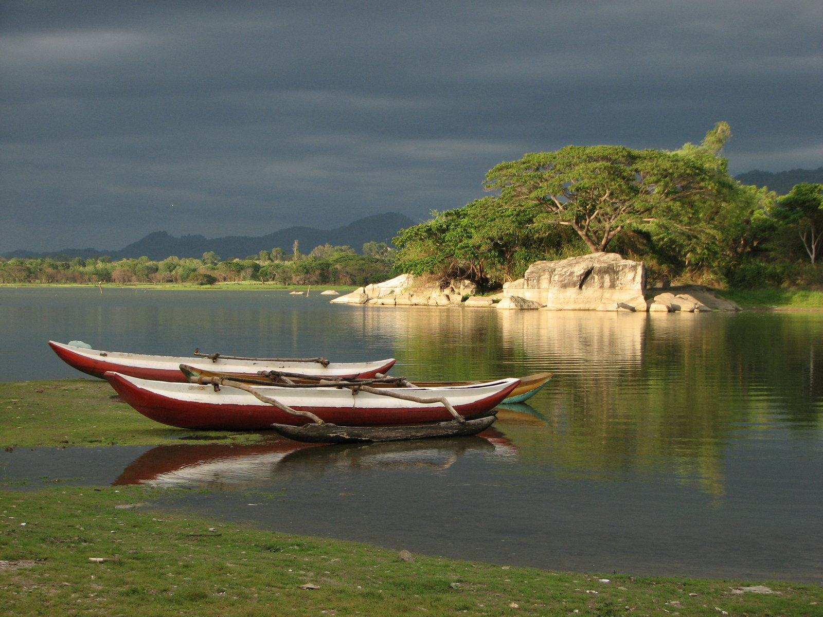 Lake at Yudanganawa in Buttala, Sri Lanka.